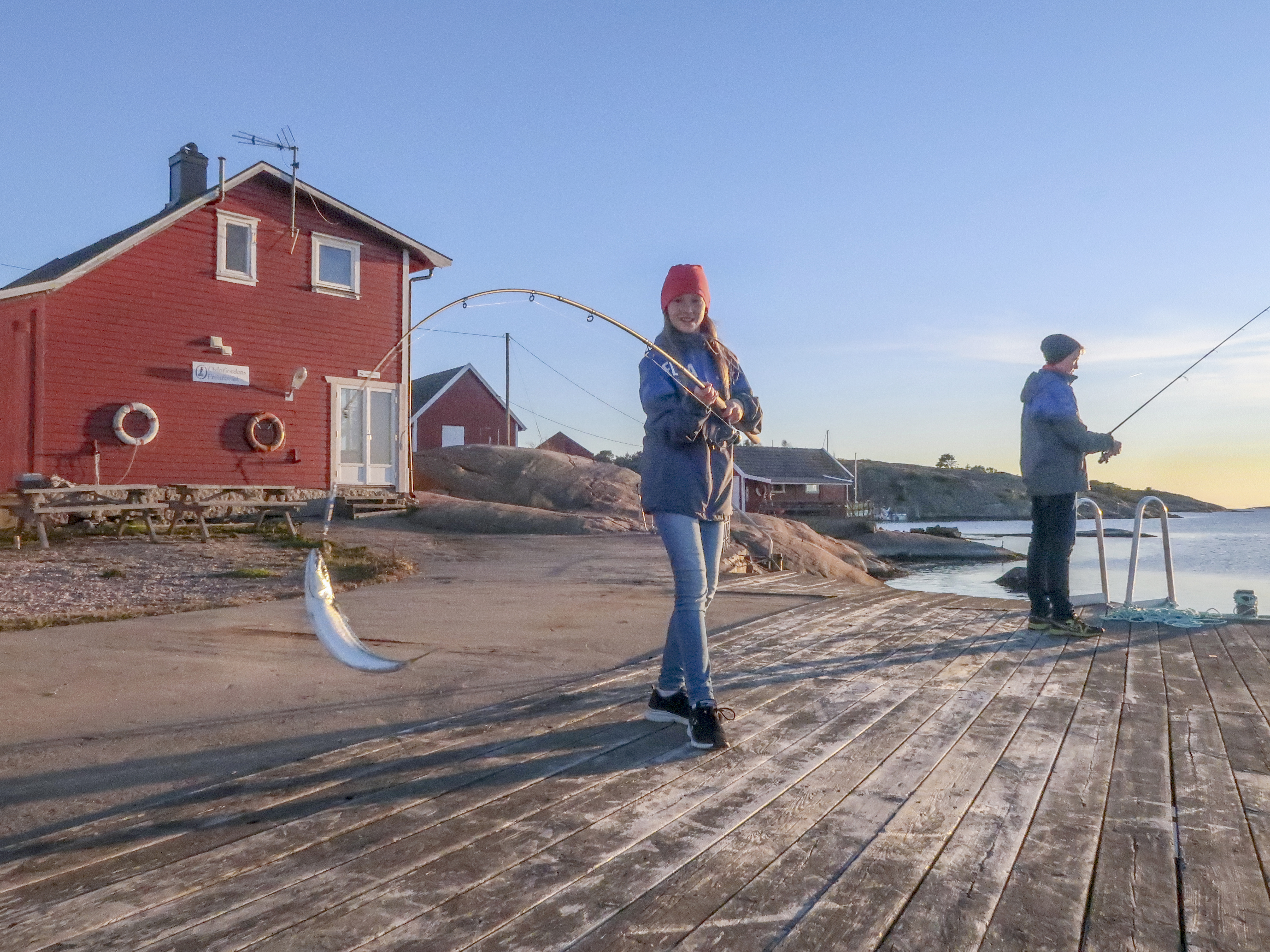 Rekefabrikken på Hvaler er en kystledhytte OF har ansvar for.